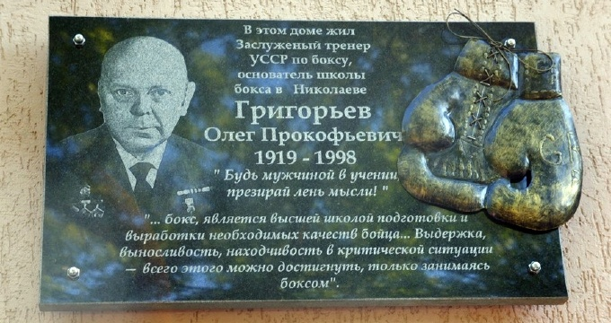 Меморіальна дошка Григор`єву Олегу Прокоф`євичу (м. Миколаїв, вул. Олега Григор`єва, буд. № 2Б )